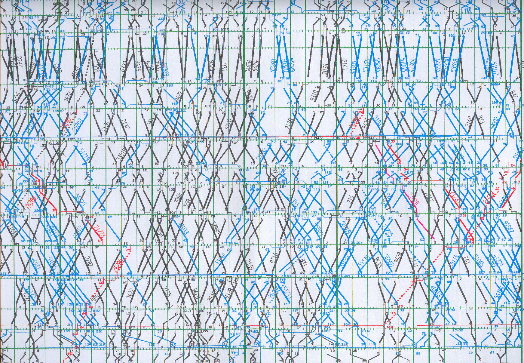 Esempio di grafico reale di traffico ferroviario in una tratta a doppio binario con traffico intenso.